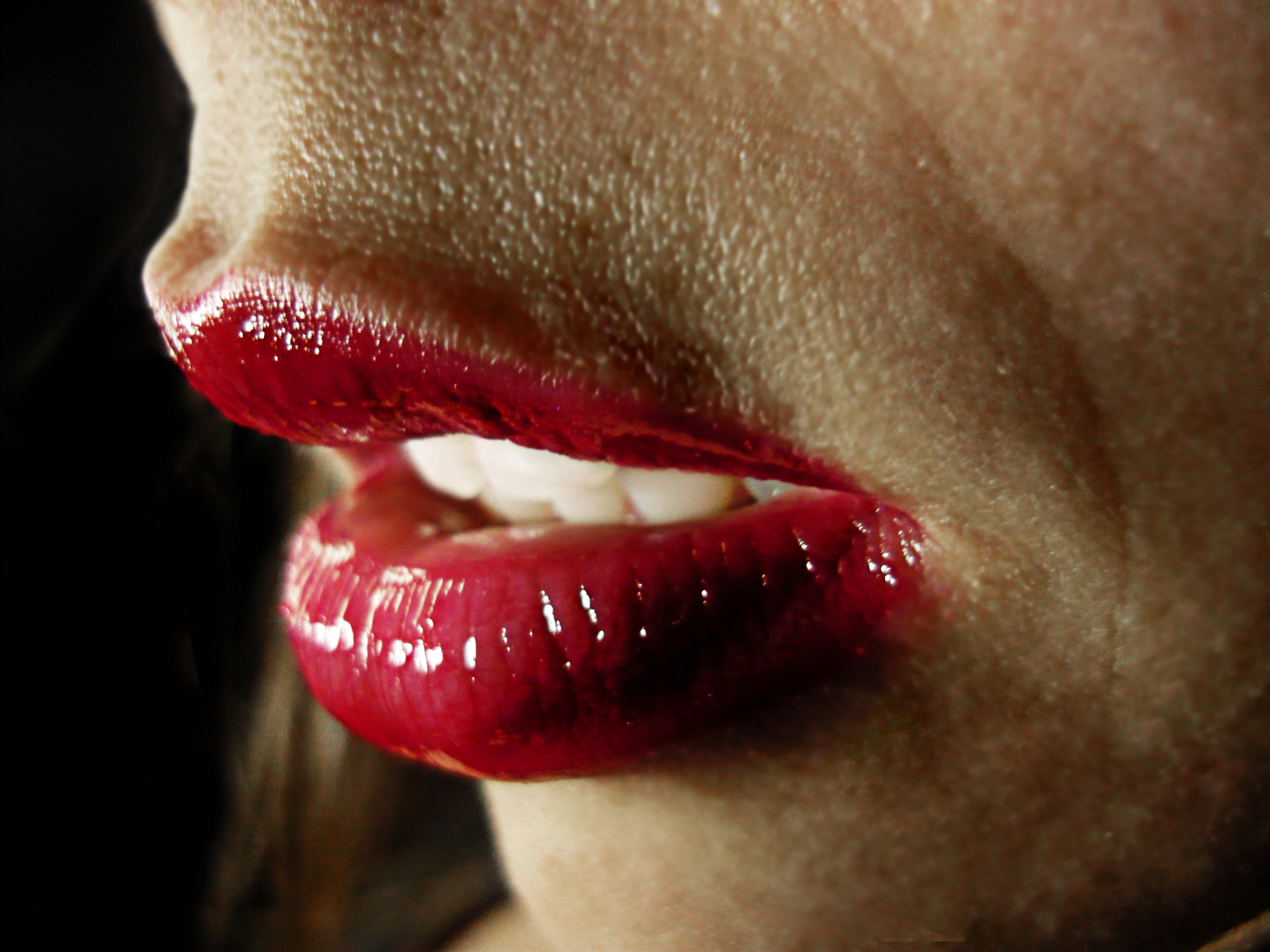 Serie: Pecados Capitales Lujuria: Tentación Modelo: Edimar Rodriguez Iluminación: Ernesto Gómez Concepto y Fotografía: Gabriel Delgado